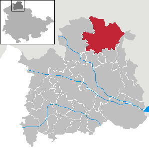 Gemeinde Ilfeld im Landkreis Nordhausen, Thüringen